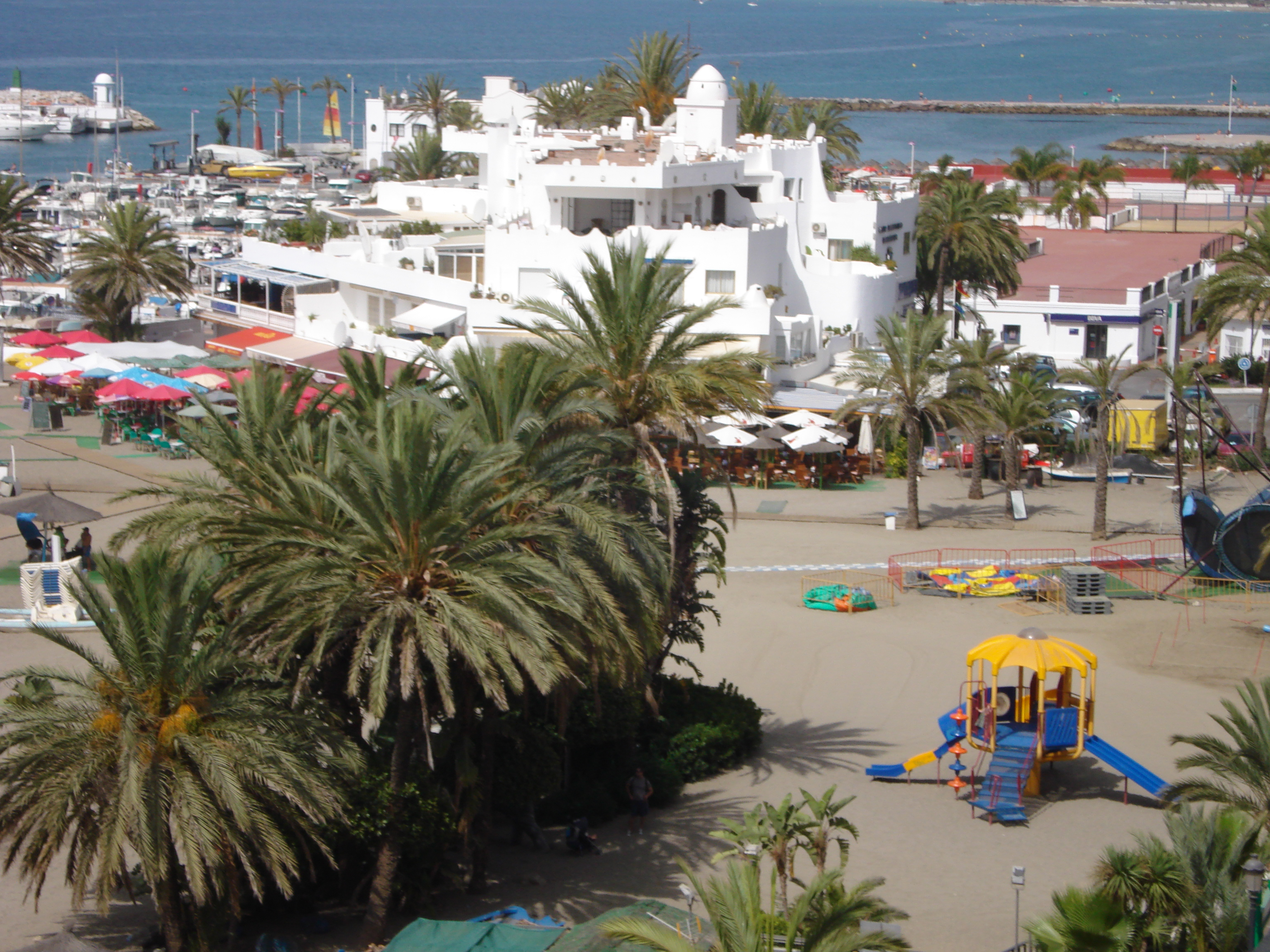 Image de la plage de Marbella, et plus précisément : les chilinguitos, le parc d'enfants et le port (Image of the beach and the port of Marbella)